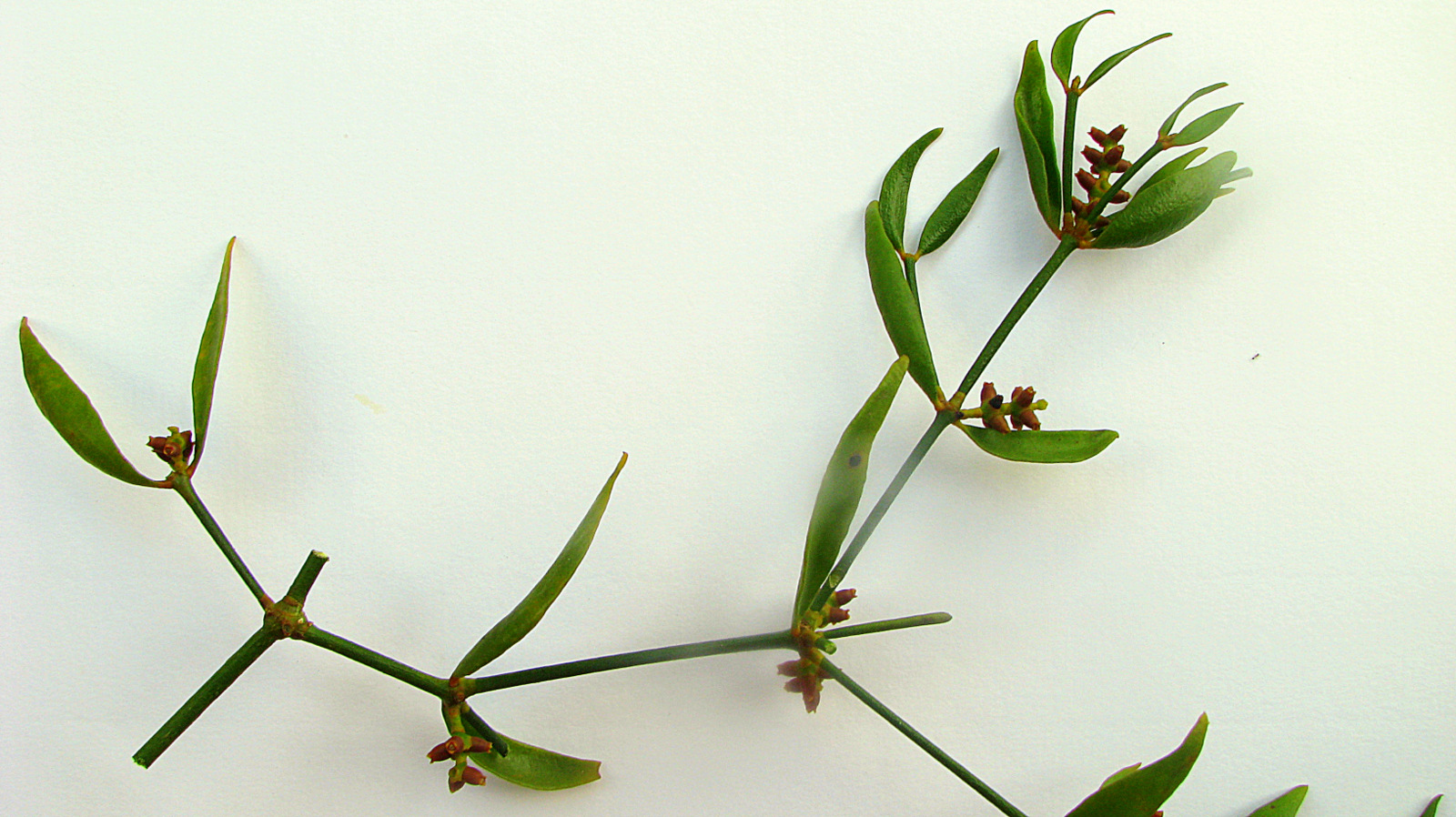 Phoradendron strongyloclados Eichler